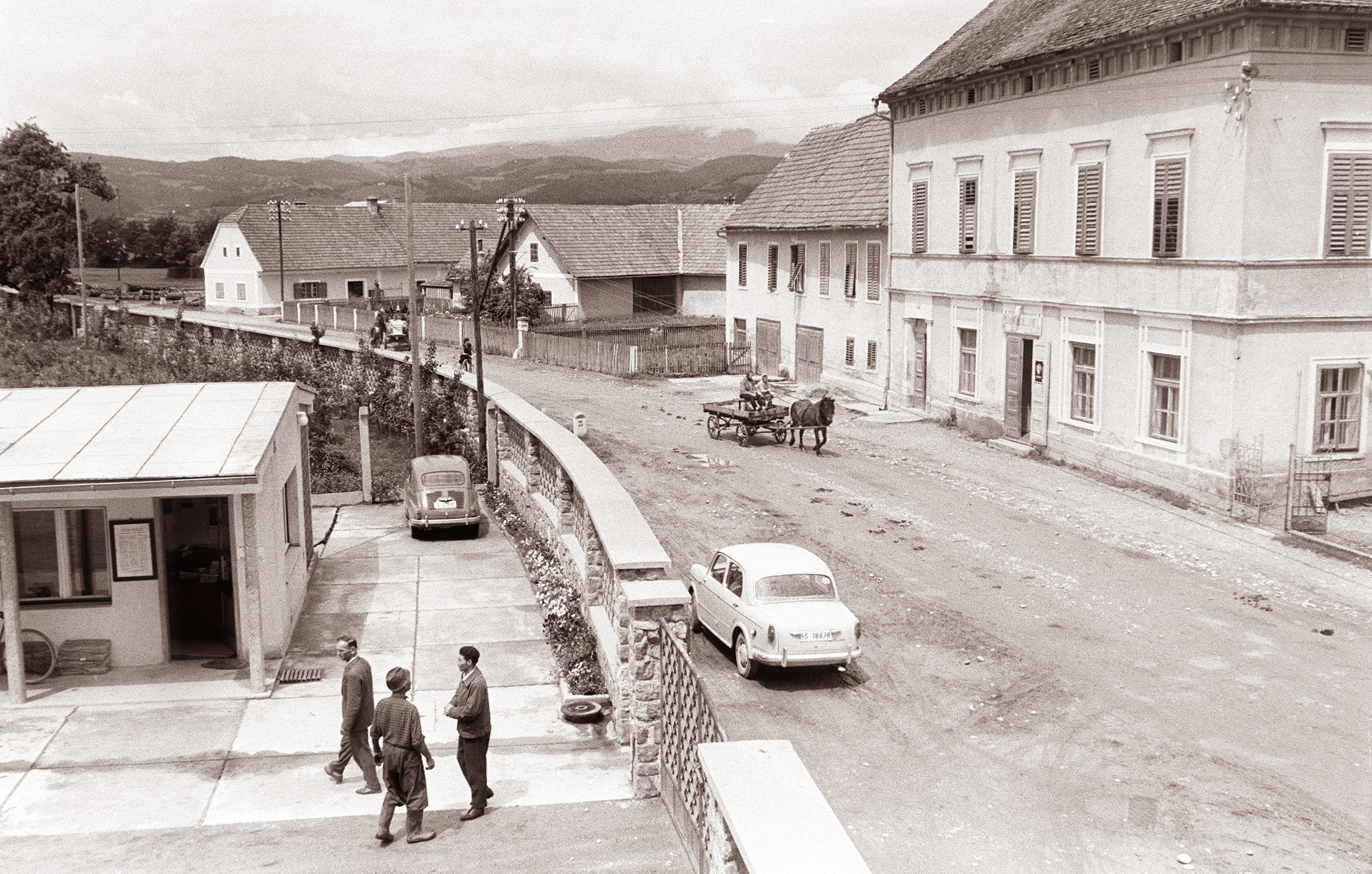 Motiv iz Rač